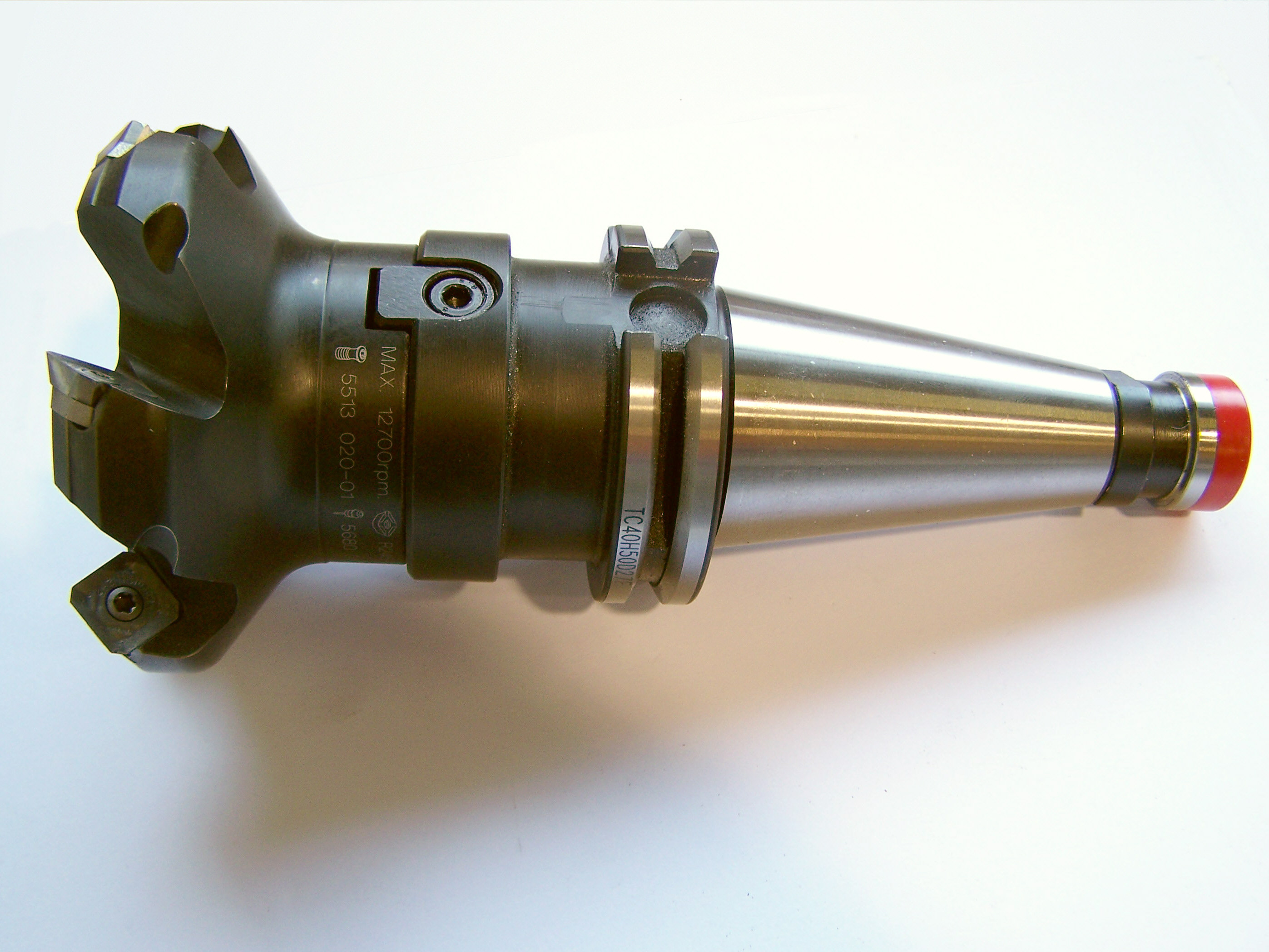 Vollhartmetall Wendeschneidplatte 45° Fräßstahl im Halter (Schlichten)